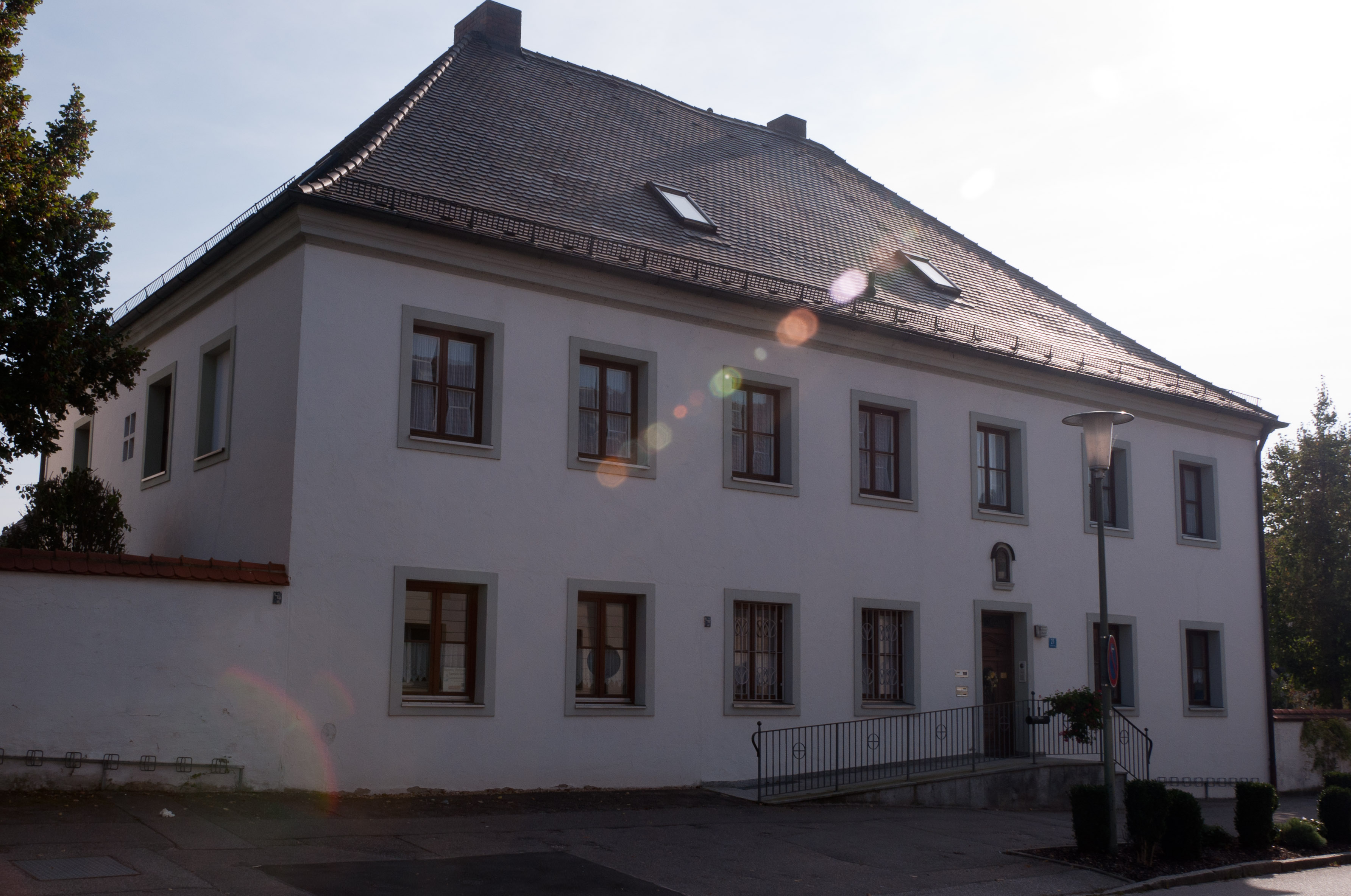 Ergolding, Lindenstraße 021; Gebäudeaussenansicht, D-2-74-126-8, Denkmal Pfarrhof - barock